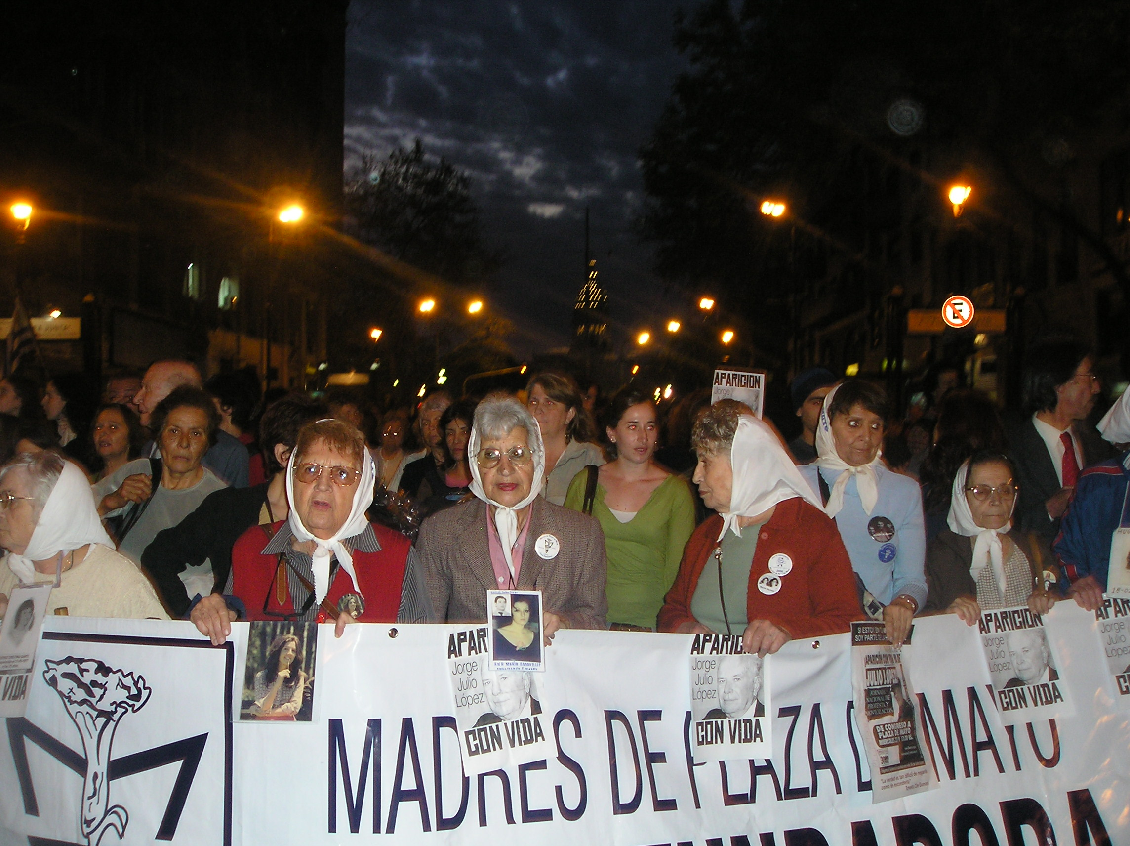 Madres de Plaza de Mayo (Línea Fundadora). Mothers of Plaza de Mayo (Foundation Line). Oct 2006.